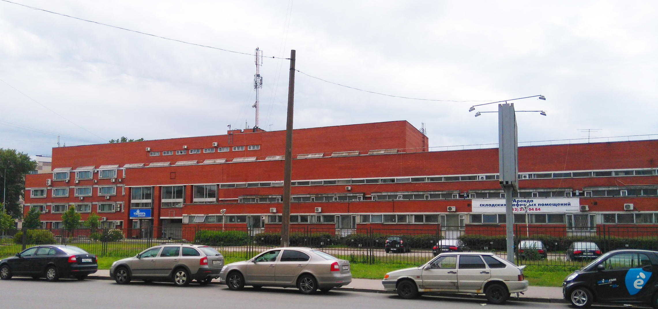 Здания агентства «Союзпечать». Архитекторы: Н.Н. Надёжин, Л. Д. Гутцайт, А. В. Шприц)